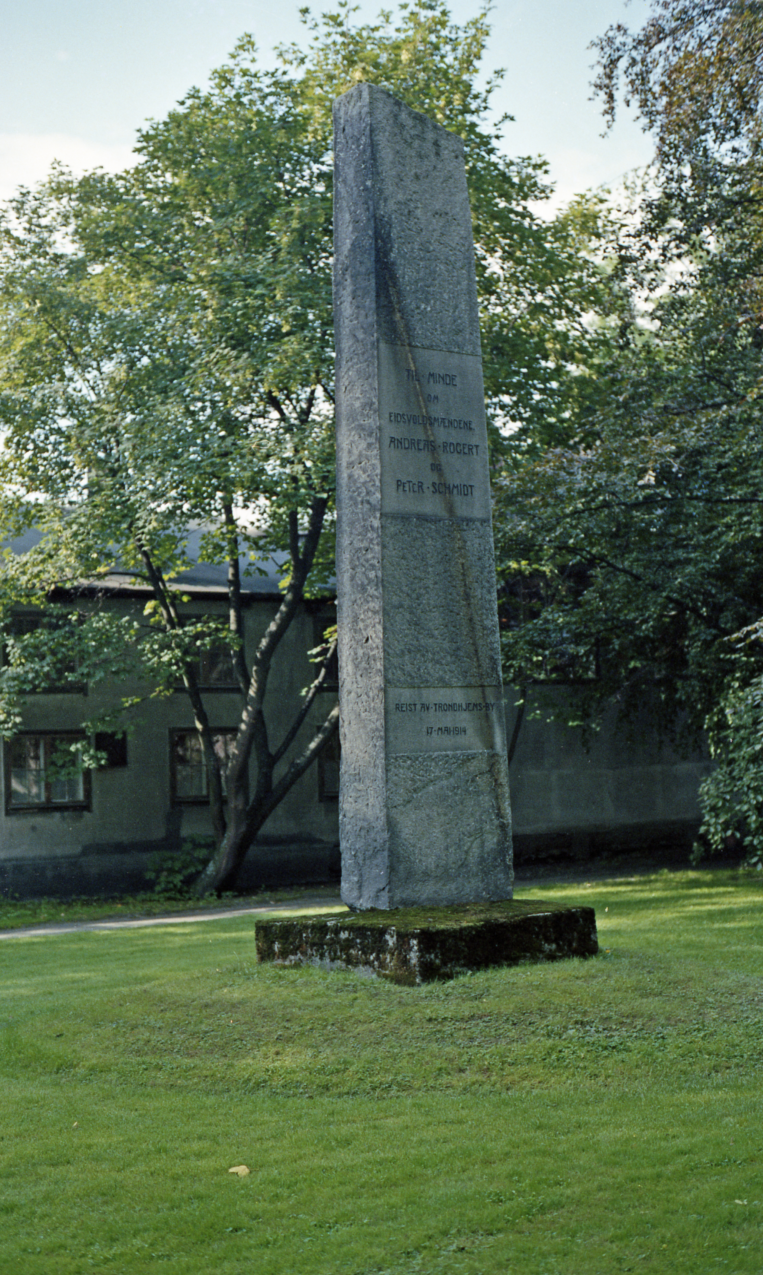 Format: Negativ 35 mm film Film: Fuji HR 100 Dato / Date: ca. 1990 Fotograf / Photographer: Byantikvaren Sted / Place: Domkirkegården, Trondheim Wikipedia: Andreas Rogert (1754 - 1833) Wikipedia: Peter Schmidt (1782 - 1845) Eier / Owner Institution: Trondheim byarkiv, The Municipal Archives of Trondheim Arkivreferanse / Archive reference: Tor.H43.B76.F18617 [Film 01] Til Minde om Eidsvoldsmændene Andreas Rogert og Peter Schmidt Reist av Trondhjems By 17 Mai 1914